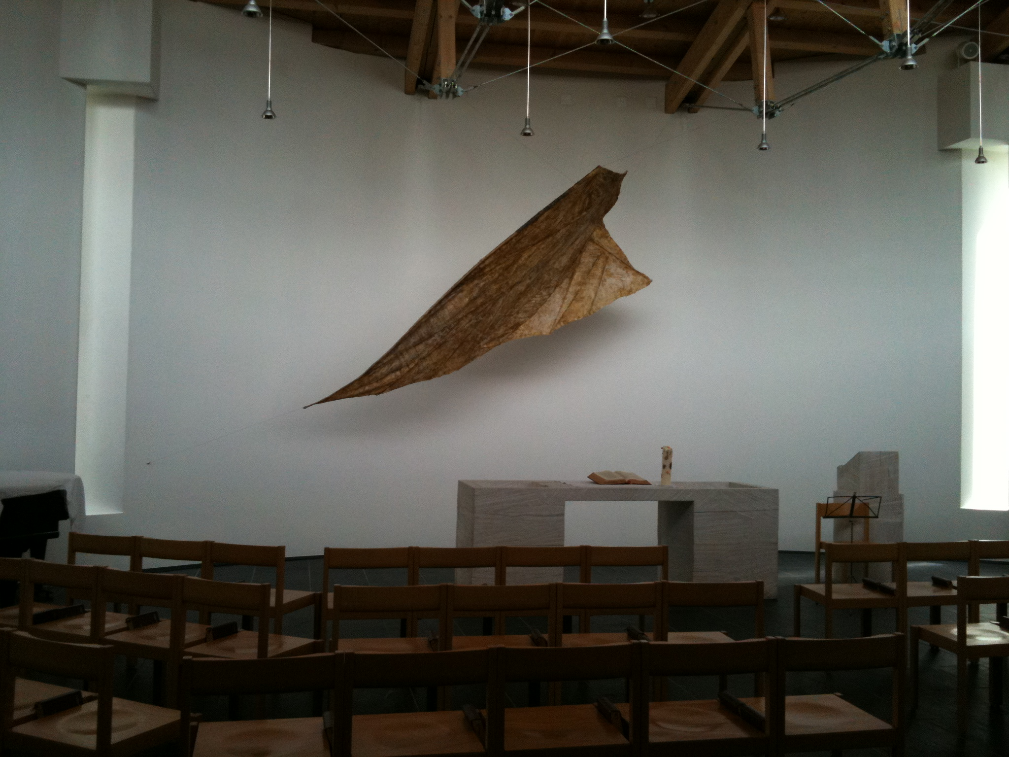 reformierte Kirche Savognin, Kanton GraubündenRumantsch: Baselgia reformada Savognin (cantung Grischun)